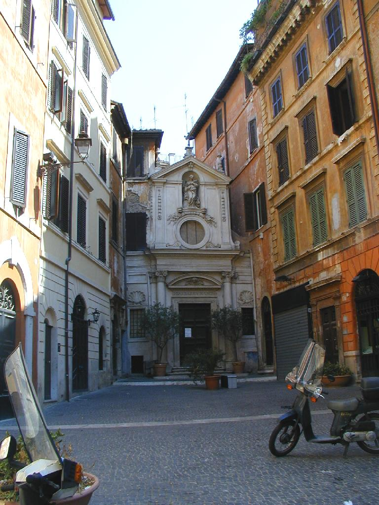 Roma, largo dei Librai e chiesa di Santa Barbara dei Librai